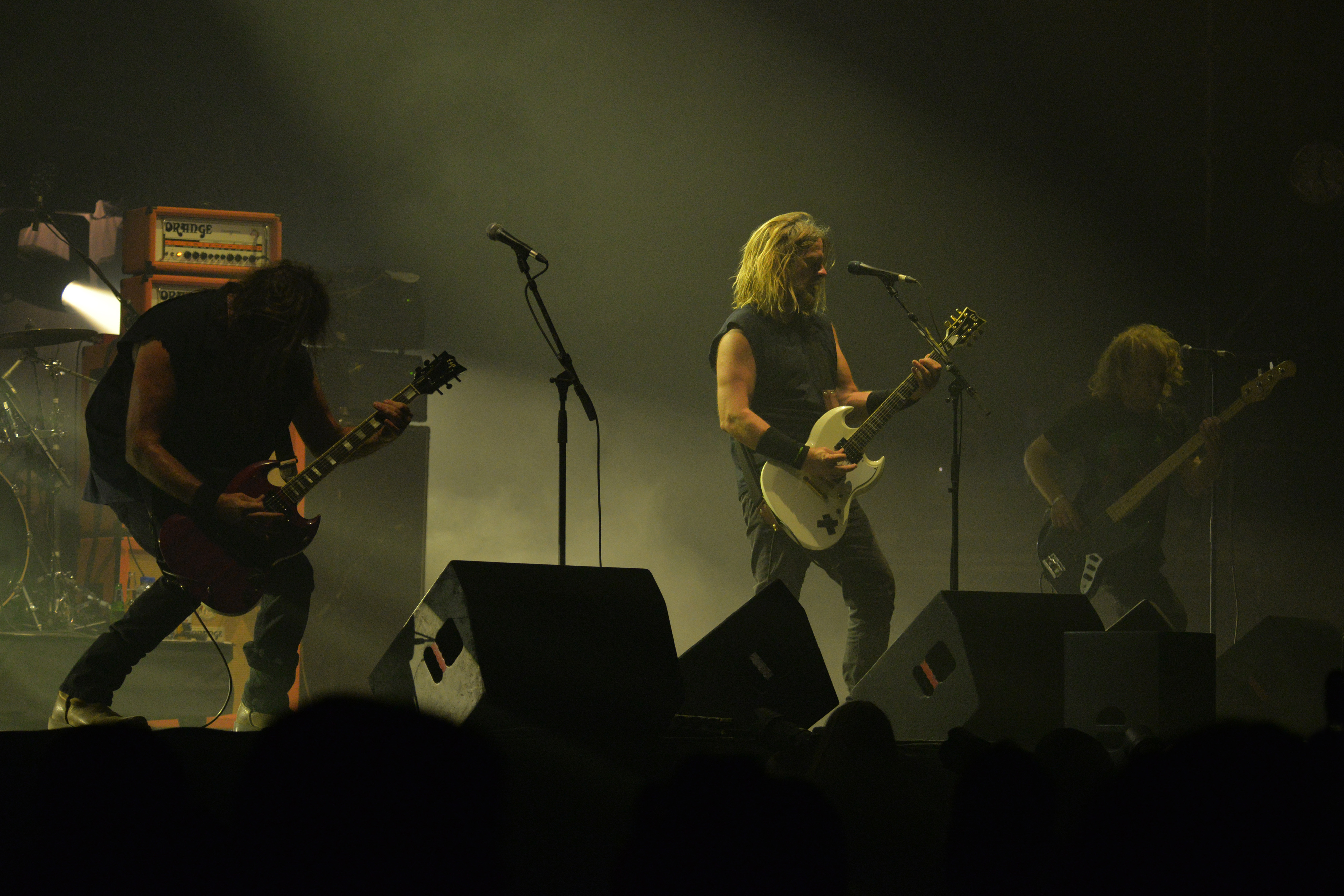 Le groupe américain Corrosion of Conformity, Hellfest 2018.